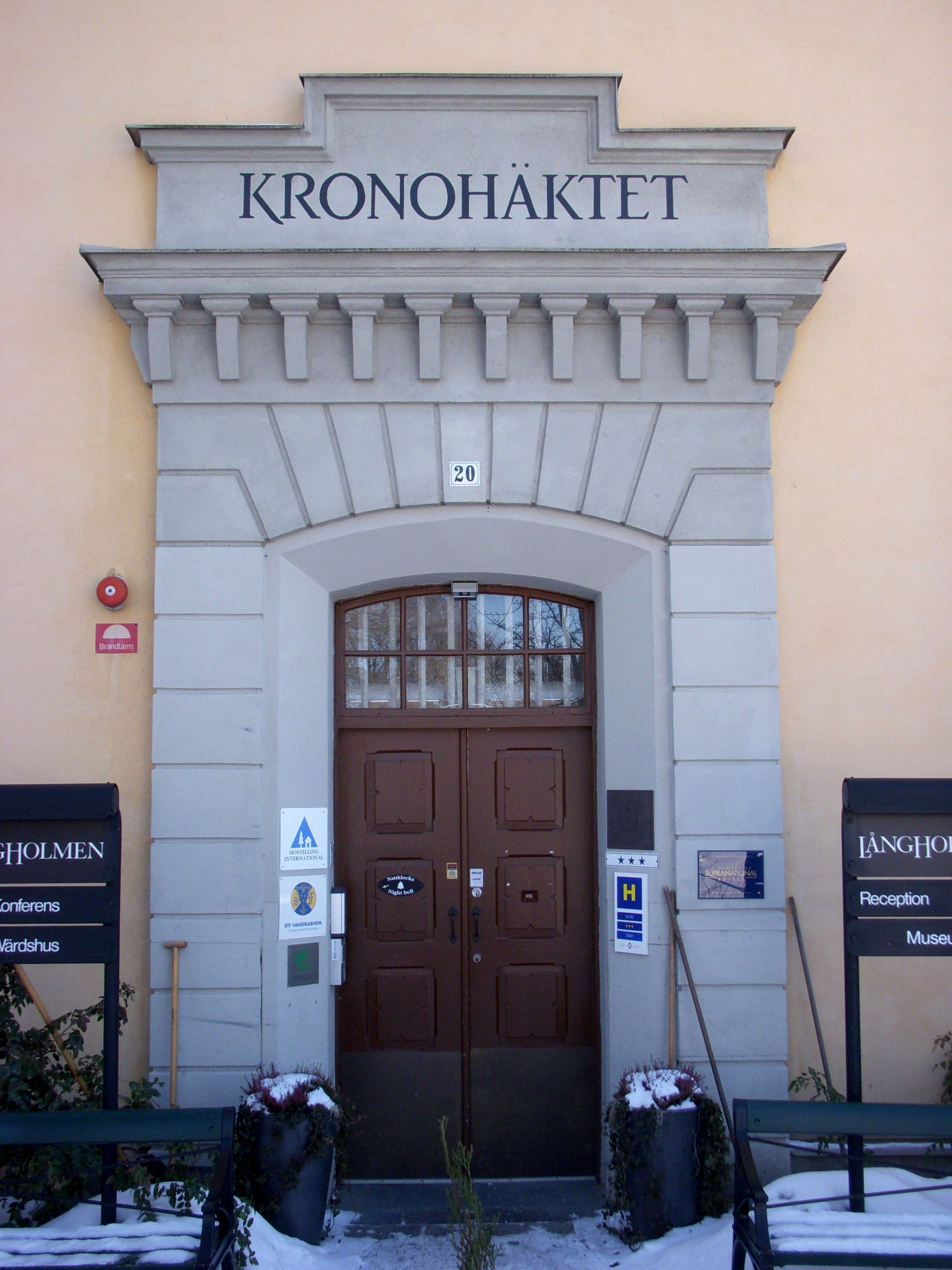 Före detta Kronohäktet på Långholmen, Stockholm